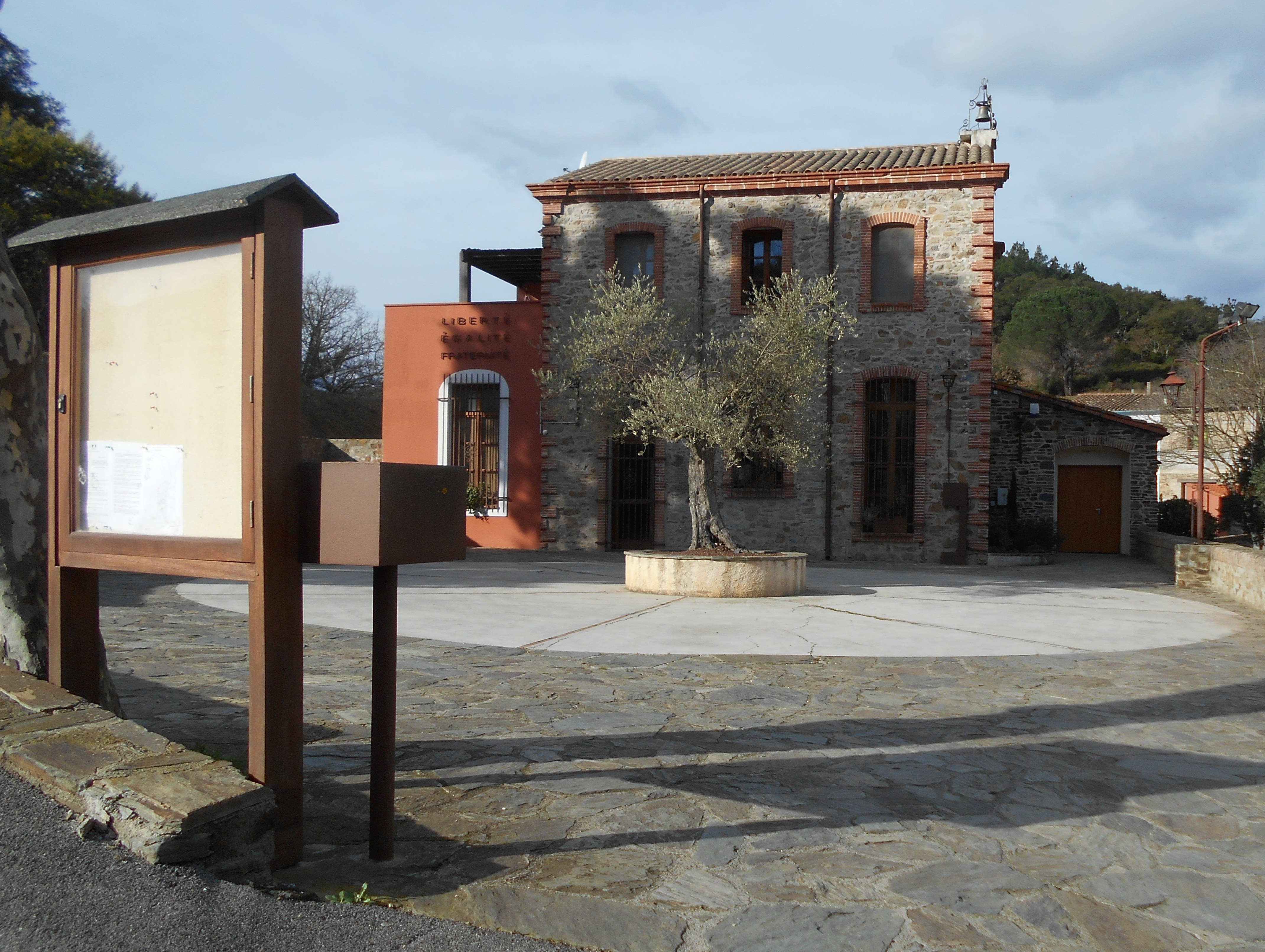 Casa de la Vila de Montoriol